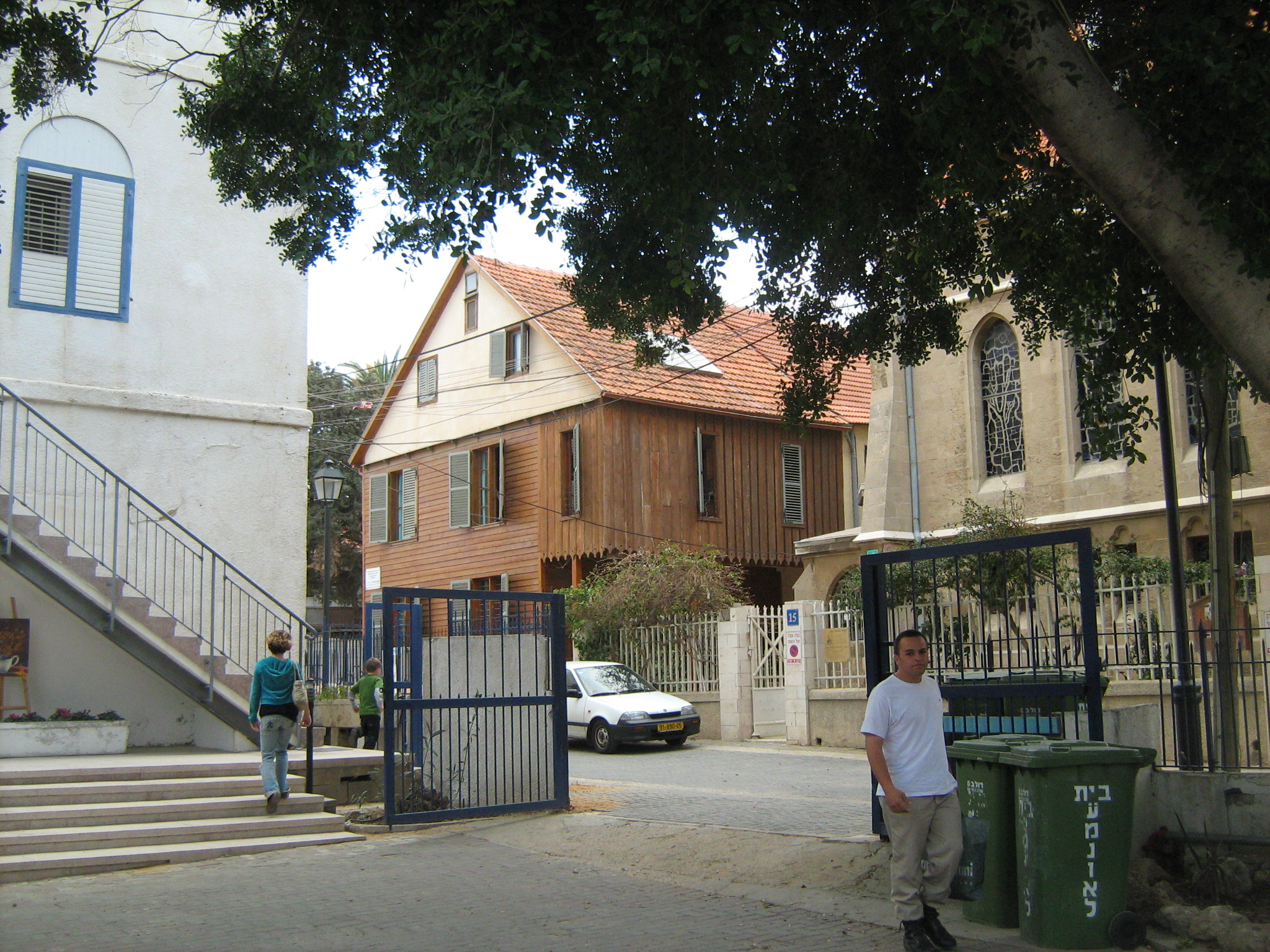 המושבה האמריקאית ביפו